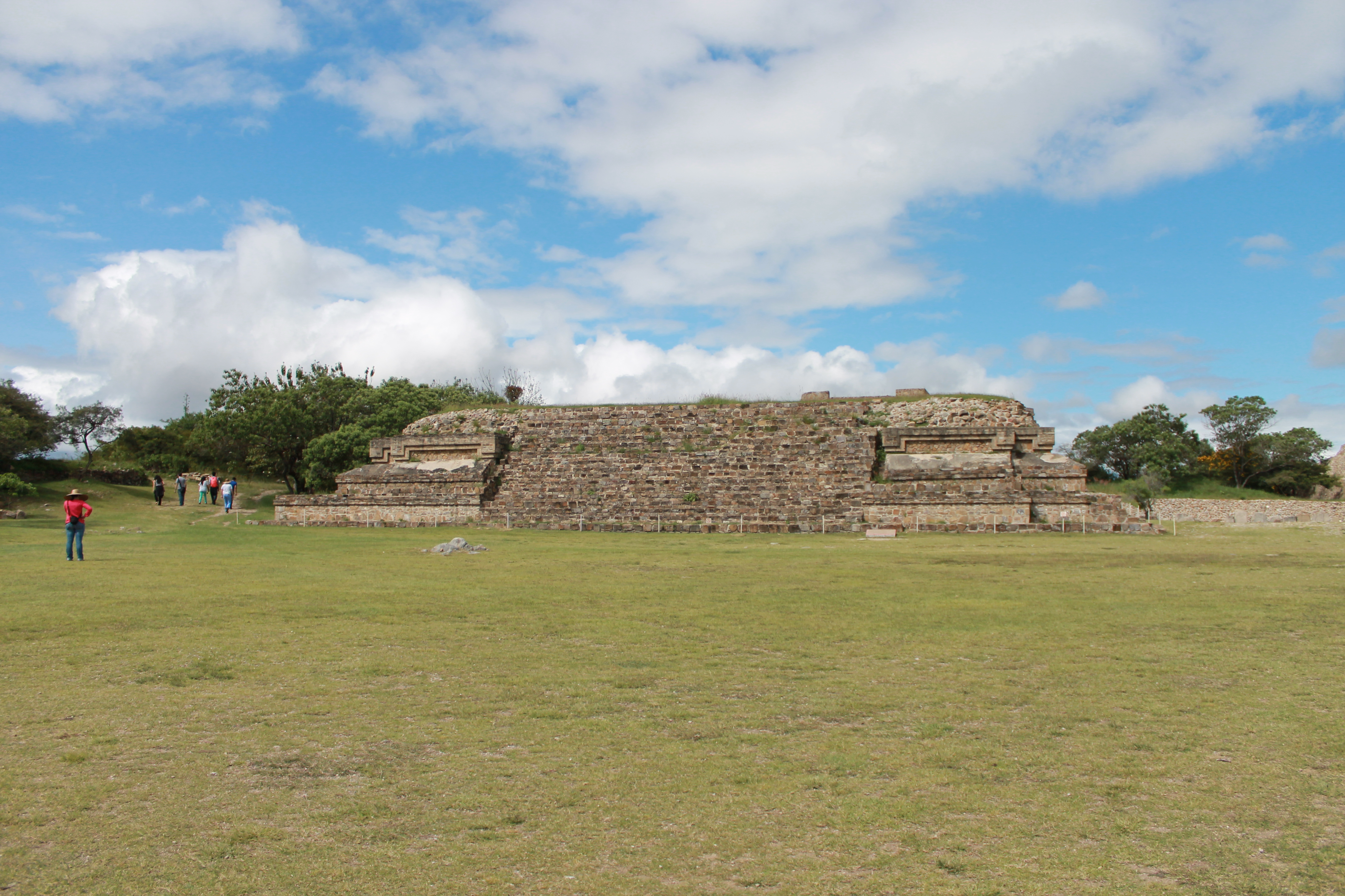 Se aprecia la escalinata y entrada a una de las edificaciones que conforman el Sistema M de la zona arqueológica de Monte Albán.